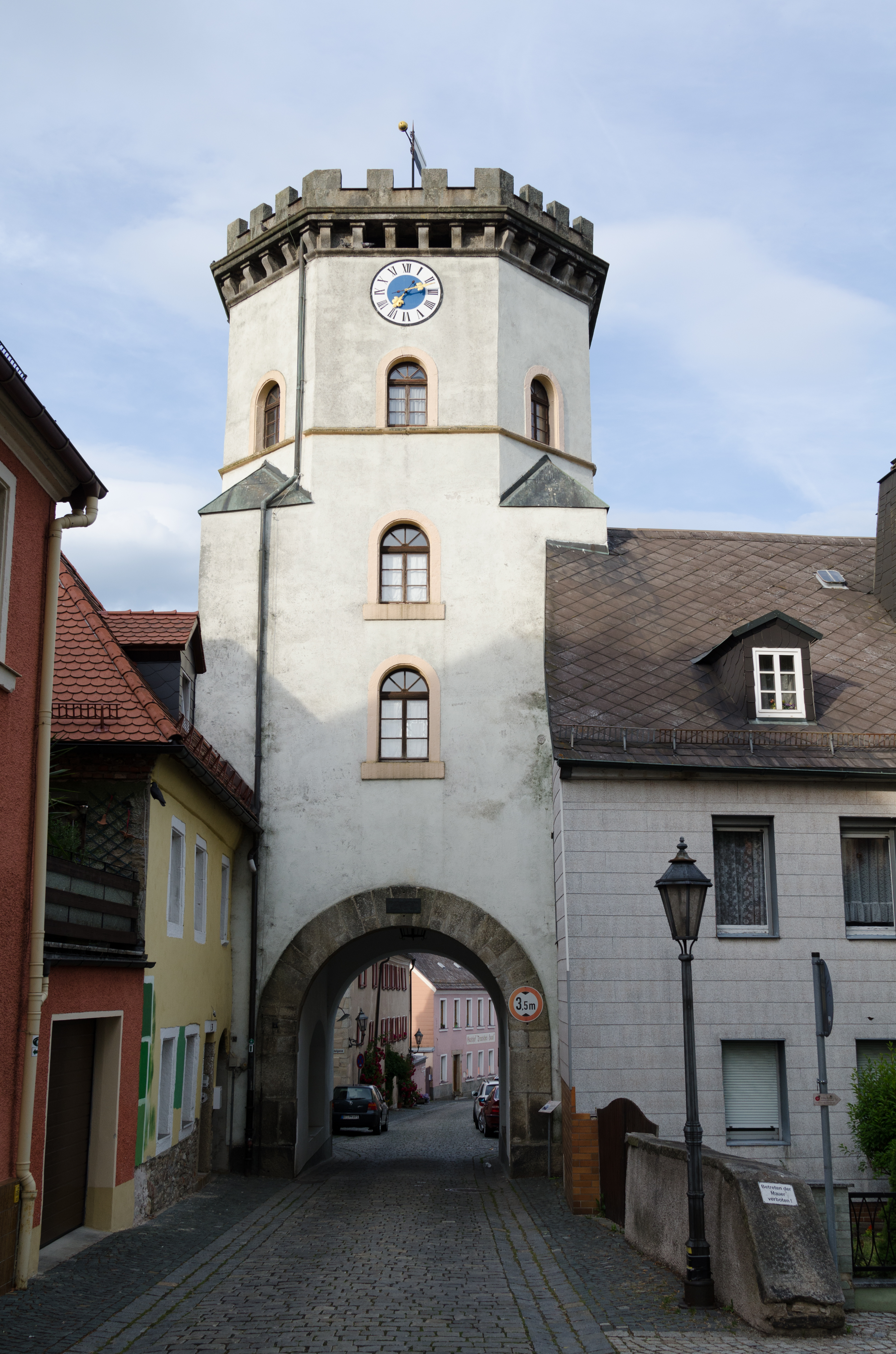 Koppetentor in Wunsiedel